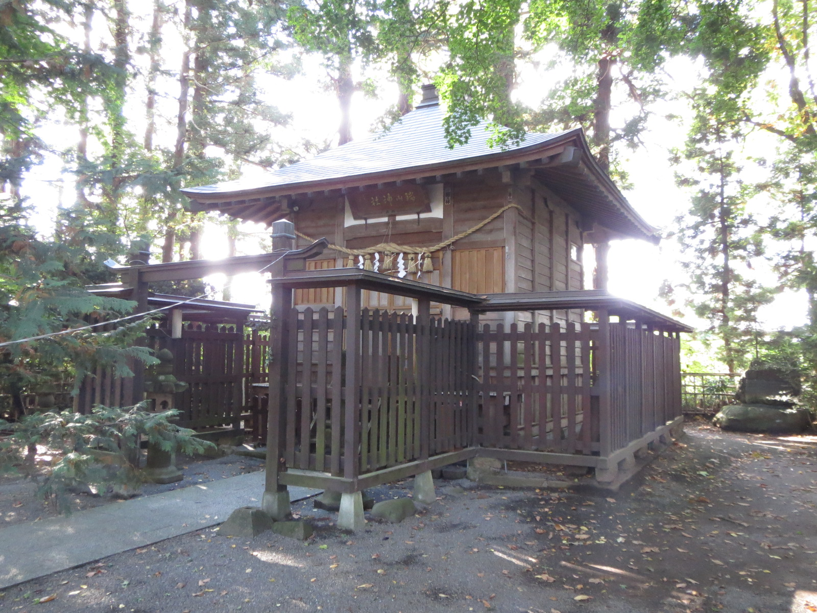 奥州市水沢区にある瑞山神社